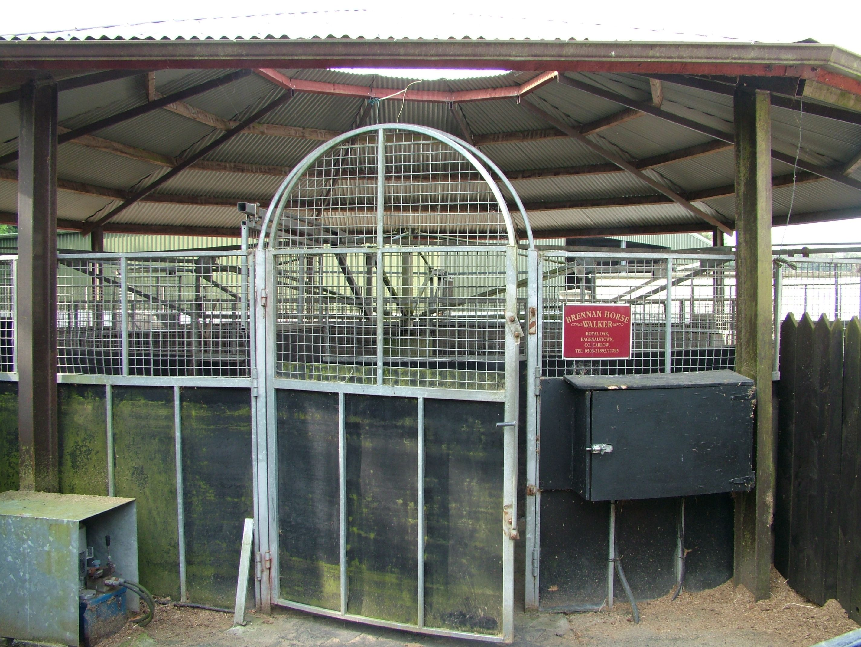 Irish National Stud, Führmaschine / Horse Walker